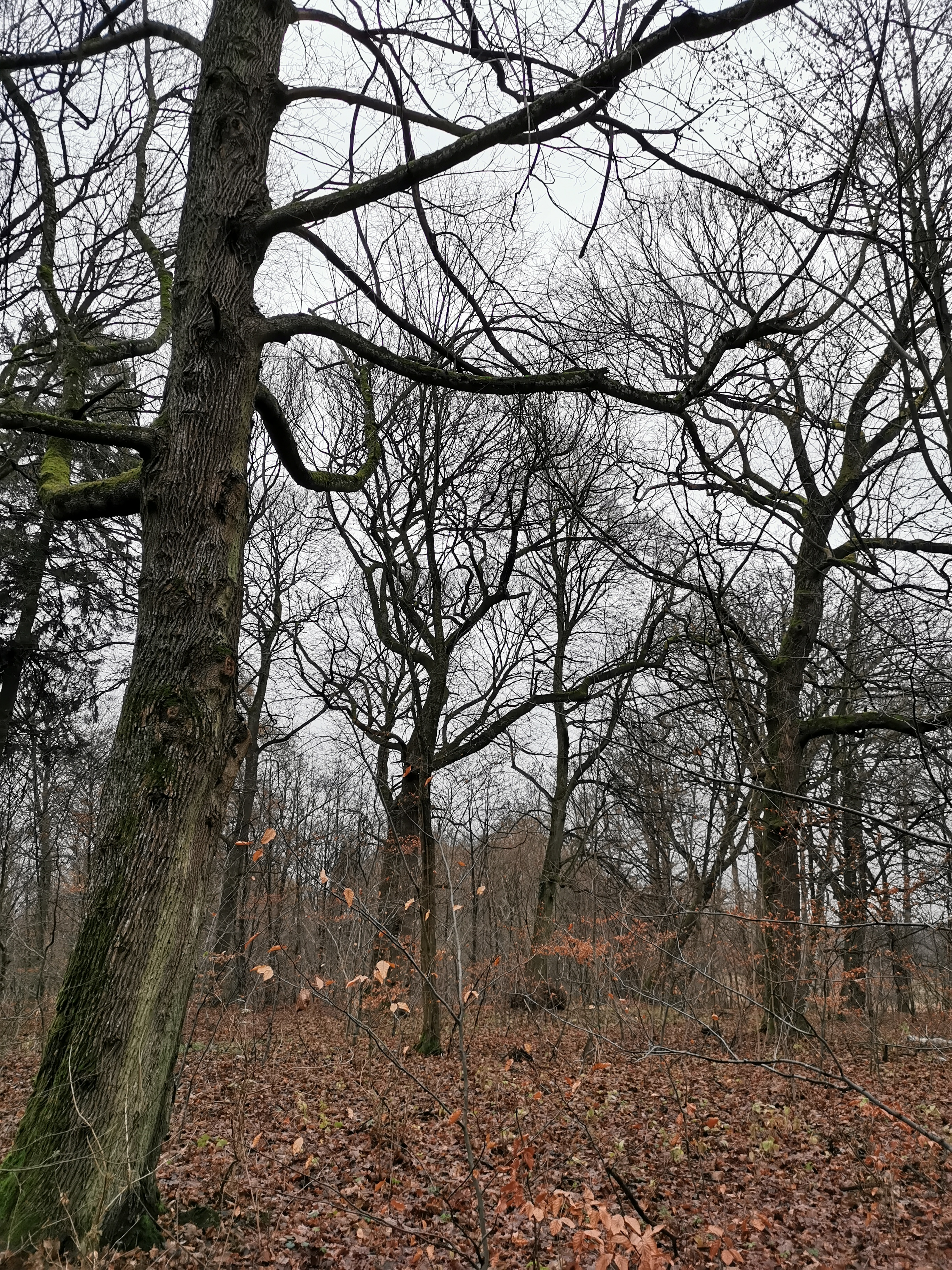 Park pałacowy w Borzęcinie